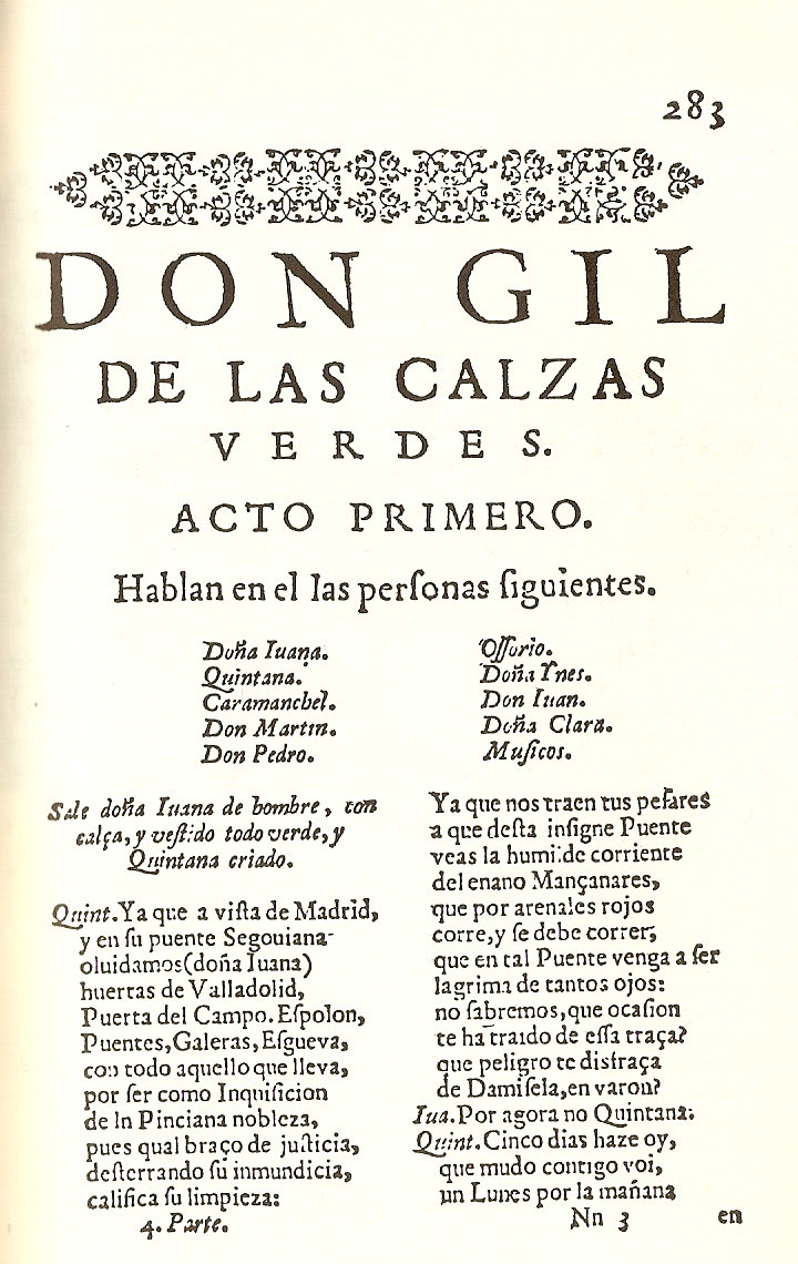 Página de la 1ª edición de Don Gil de las calzas verdes